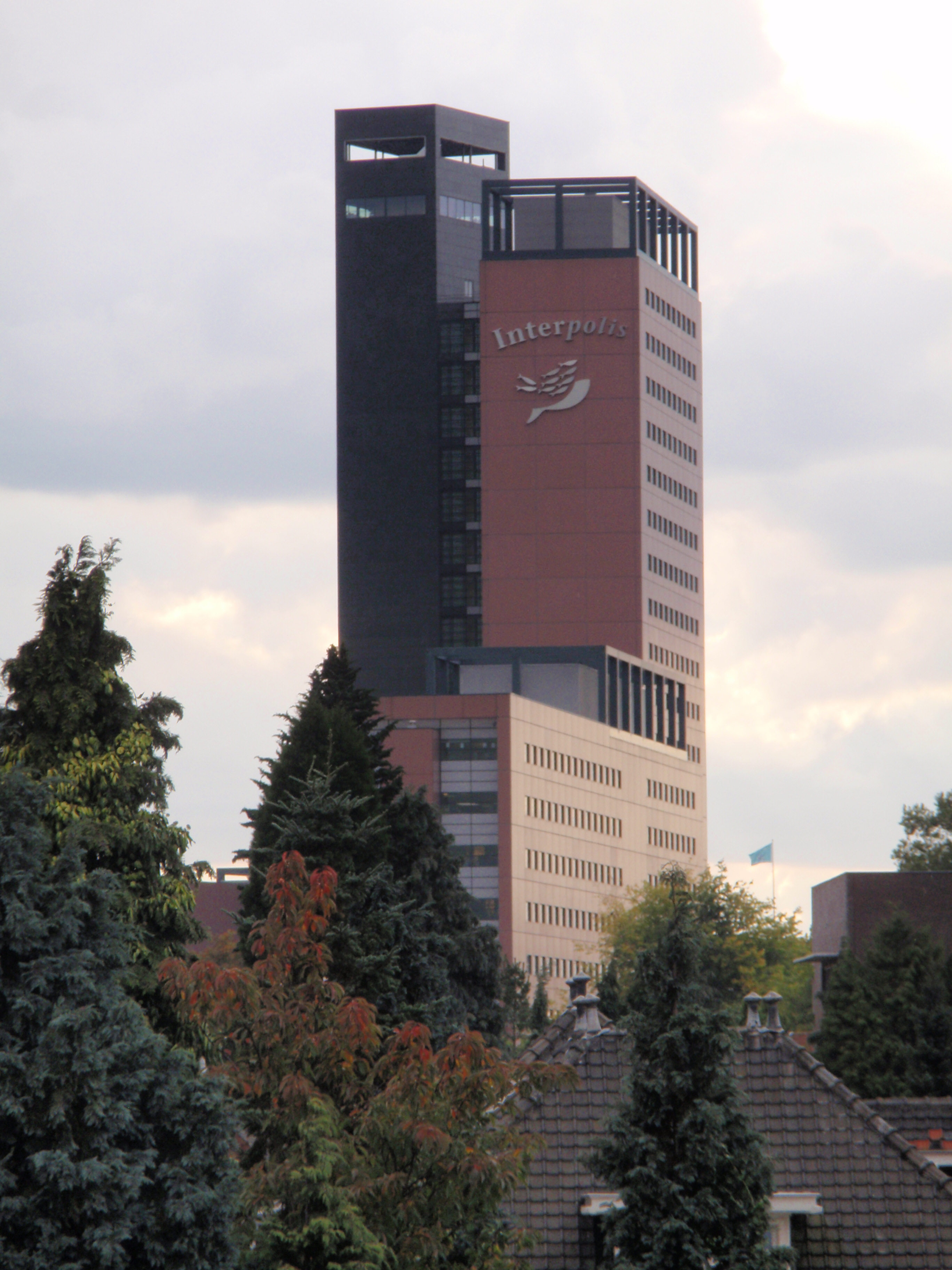 Interpolis (Tilburg)